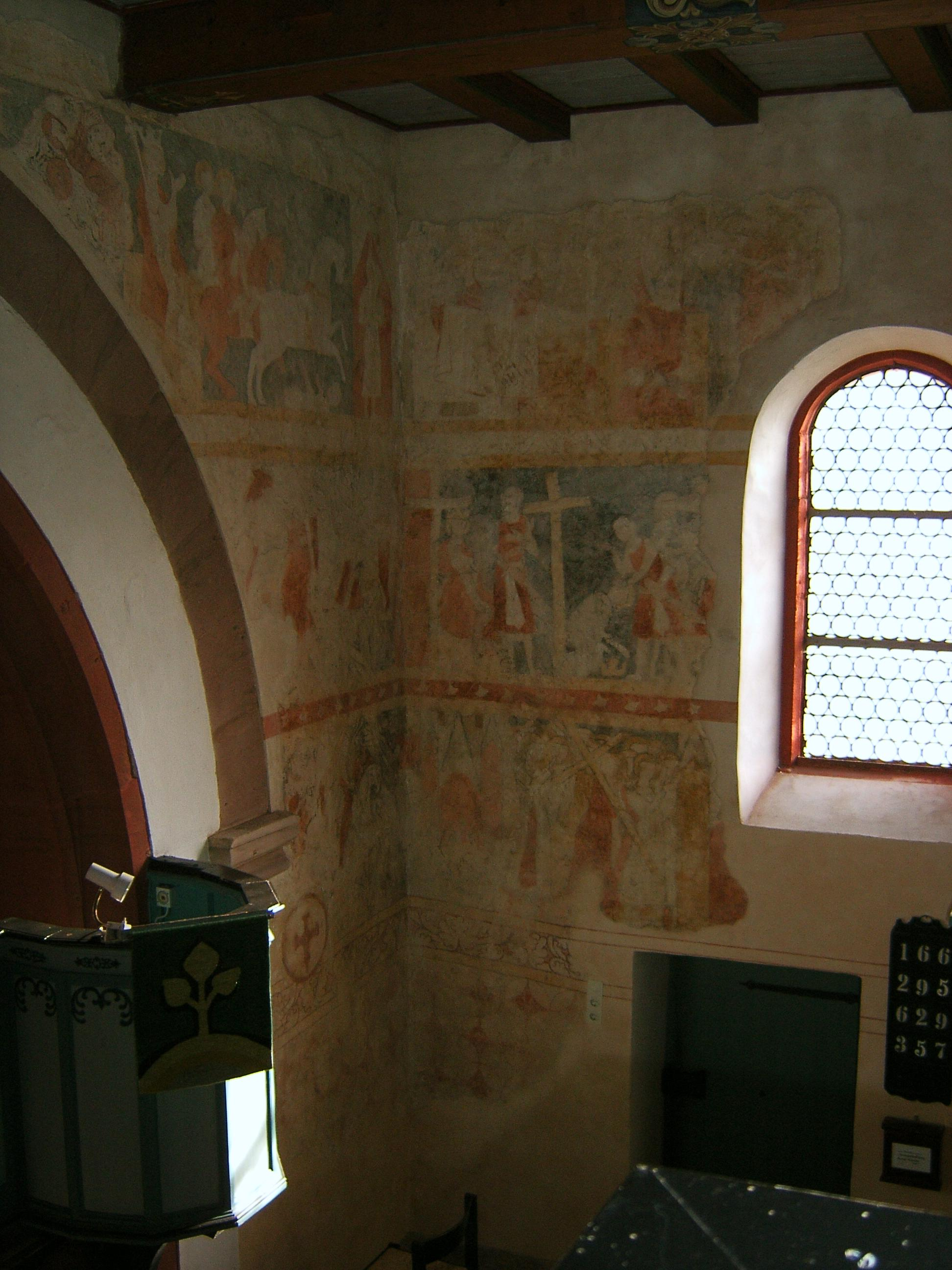 Fraurombacher Heraklius-Wandmalereien, eigenes Bild